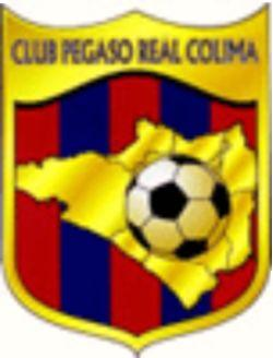 (Edicion Propia) Real de Colima "Tuberos"